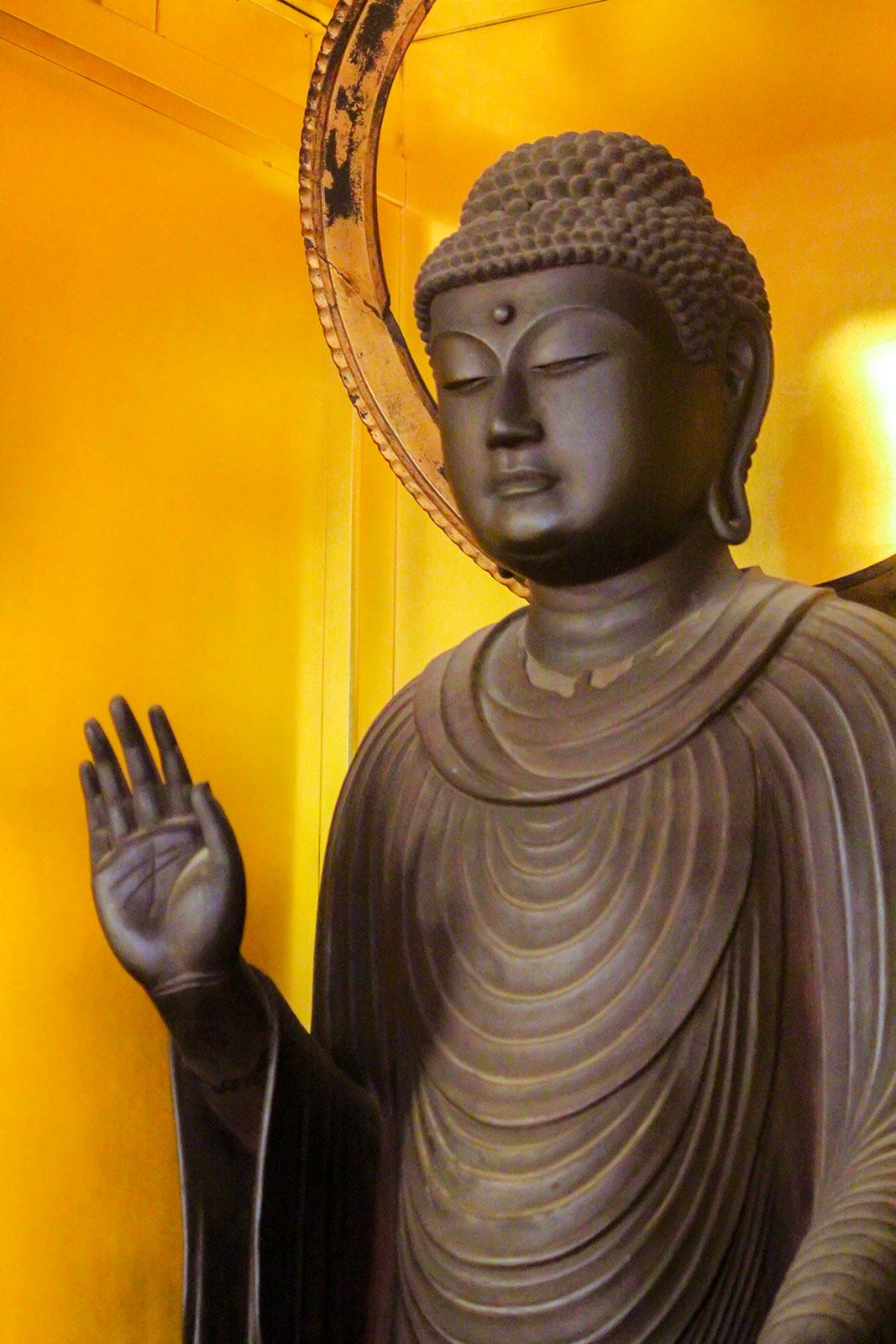 清凉寺式釈迦如来像